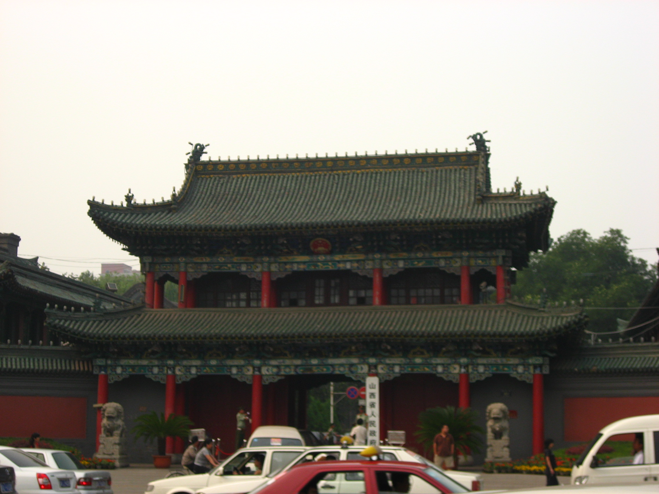 山西省政府辦公室